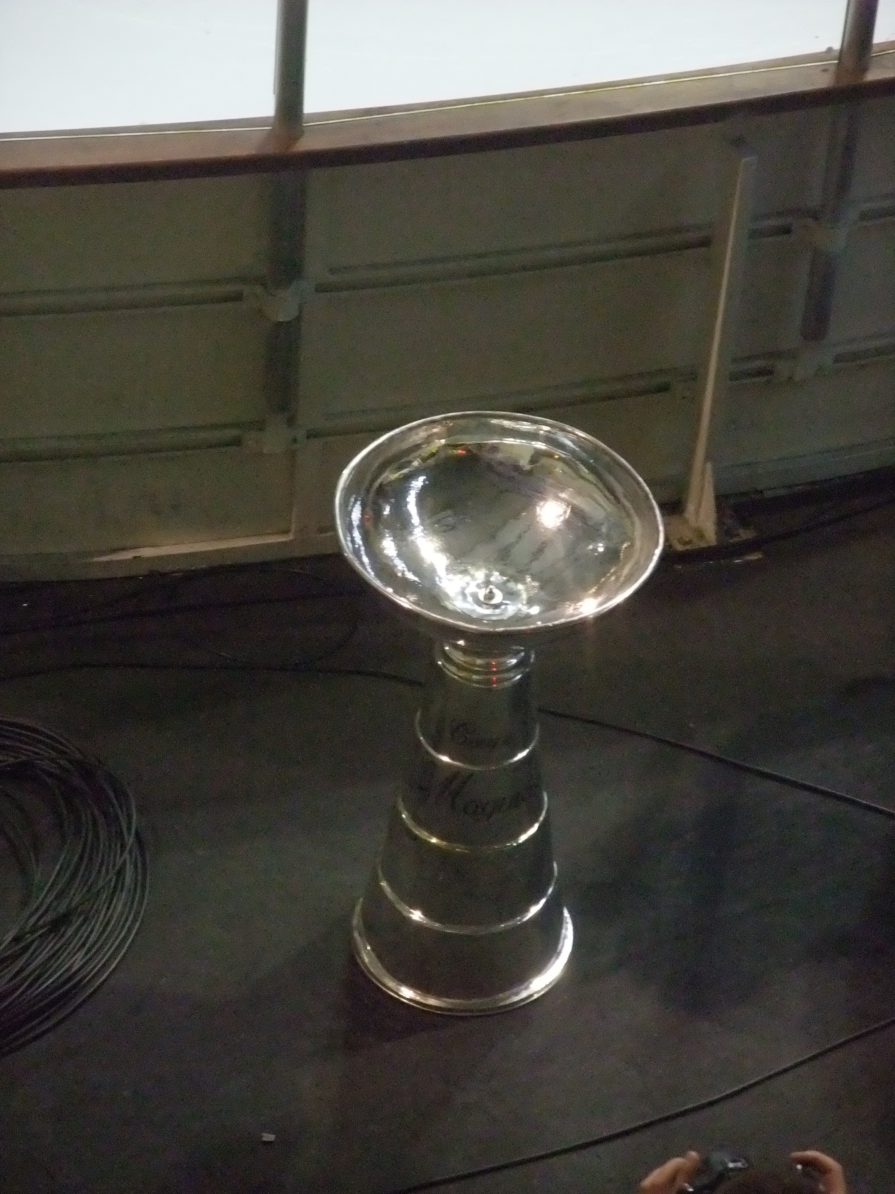 la Coupe Magnus présentée lors du dernier match de la finale Rouen-Angers à l'Île Lacroix